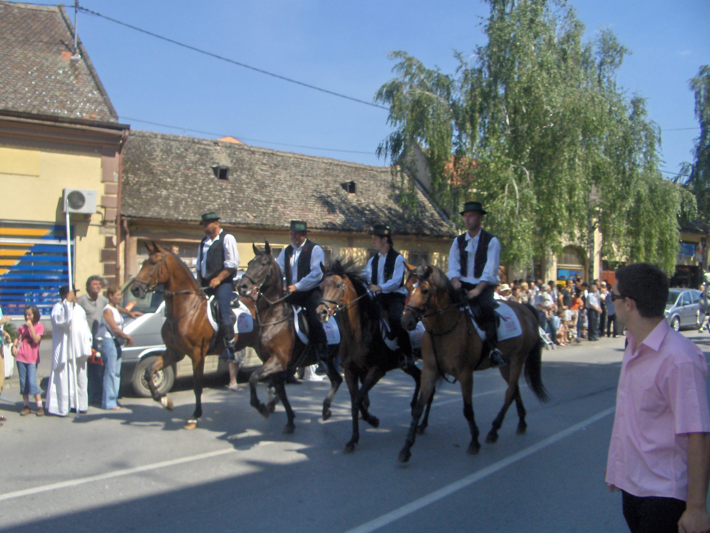 Mimohod jahačkih skupina prigodom proslave đakovačkih Vezova 2007. godine.